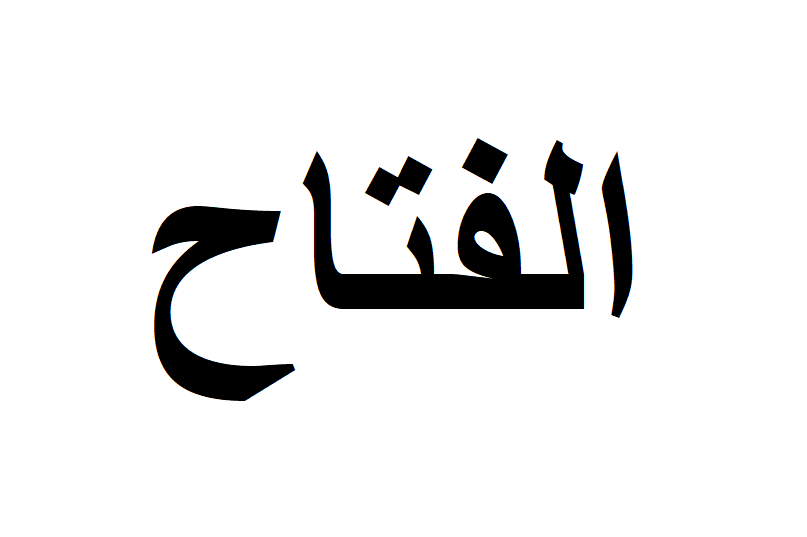 Написание эпитета Аль-Фаттах на современном арабском языке